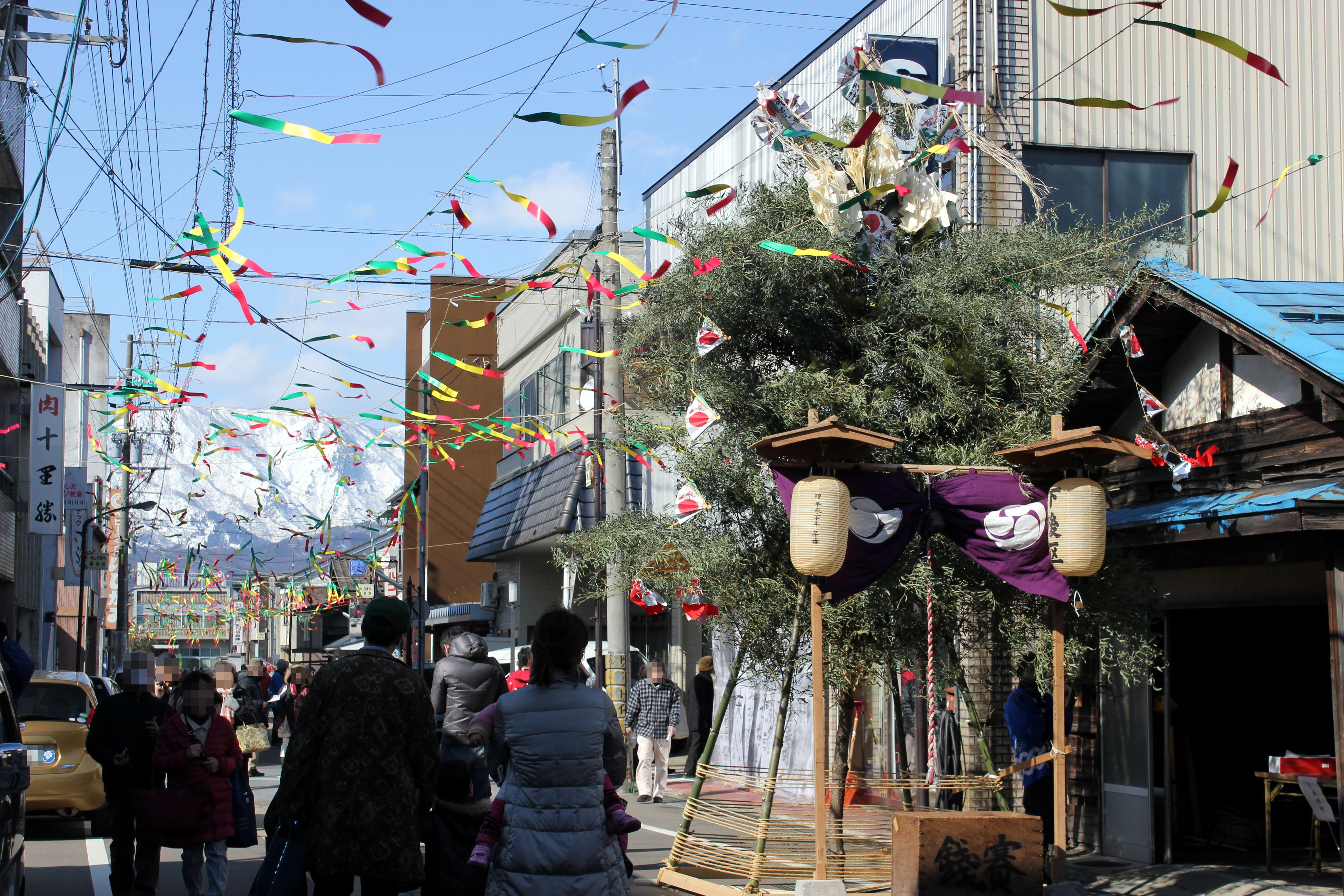 勝山左義長で飾られる短冊